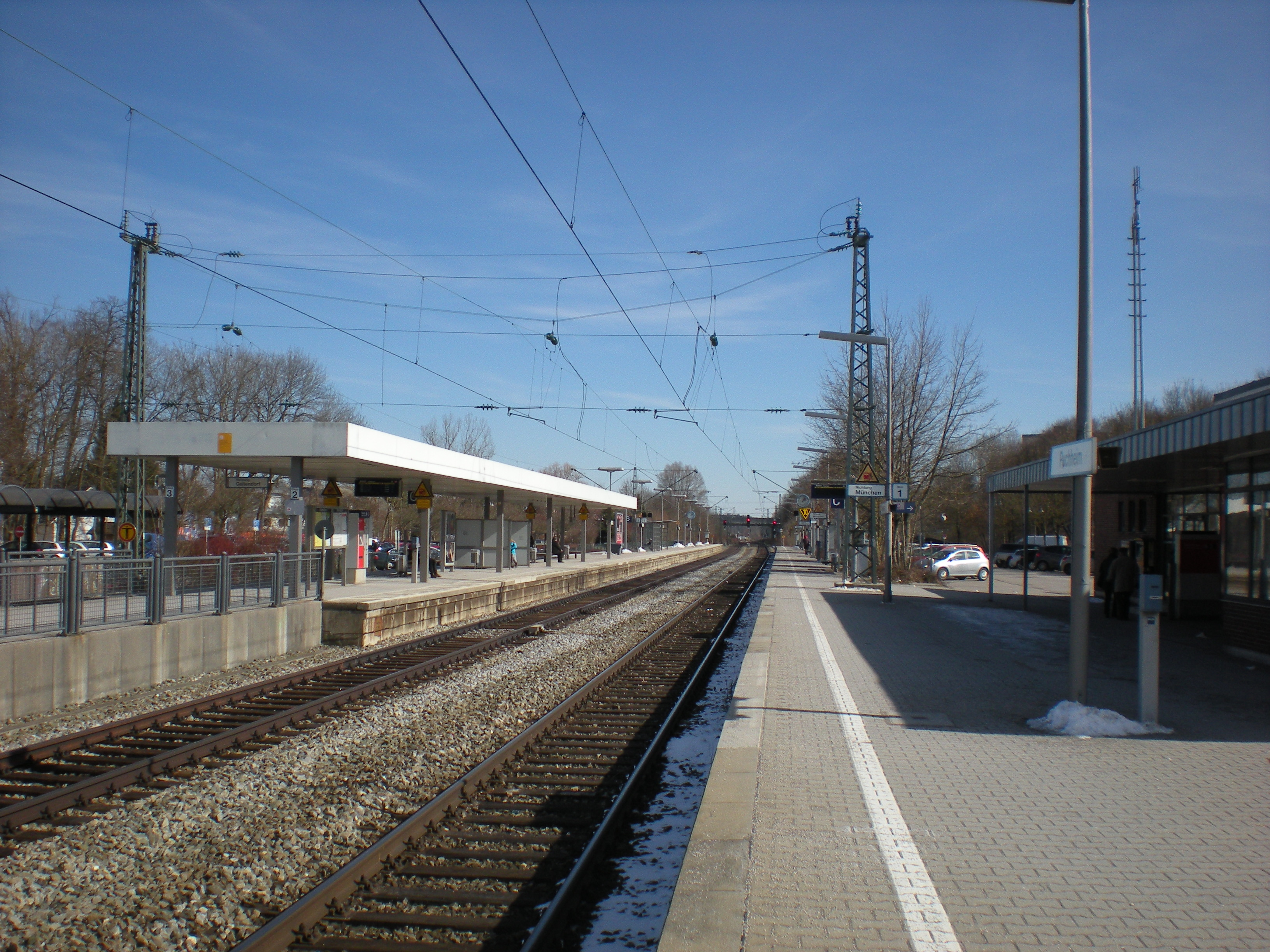 Bahnsteige des Münchner S-Bahnhofs Puchheim